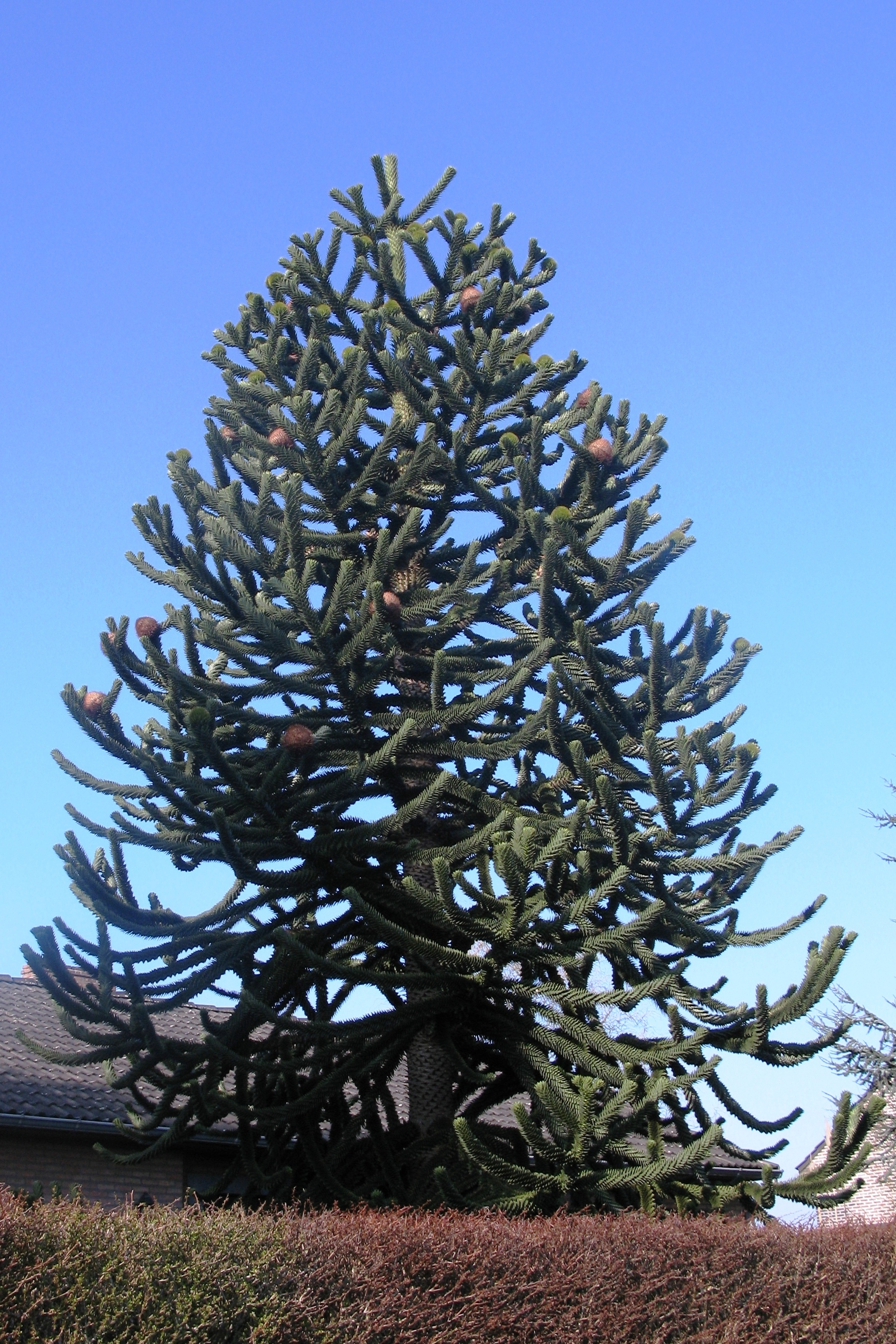 Aafebaam mat Friichten.